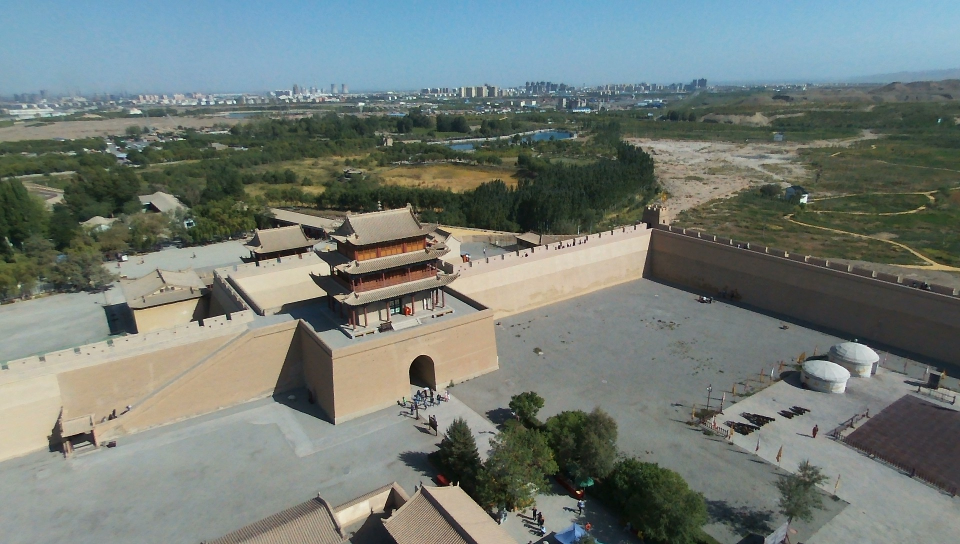 Ten materiał wykonano dronem Parrot Bebop Drone dzięki współpracy z firmą Parrot Polska.Materiały wykonane tym sprzętem możesz zobaczyć w kategorii: Taken with Parrot Bebop Drone. English | polski | +/− The making of this document was supported by Wikimedia Polska. To zdjęcie zostało wykonane podczas Wikiwyprawy 2015.Wszystkie zdjęcia z wyprawy możesz zobaczyć w kategorii: Wikiwyprawa 2015. English | polski | +/− To zdjęcie zostało załadowane dzięki współpracy z firmą Hyperbook. polski | +/− To zdjęcie zostało załadowane dzięki współpracy z firmą: Kopex Group. English | polski | +/−